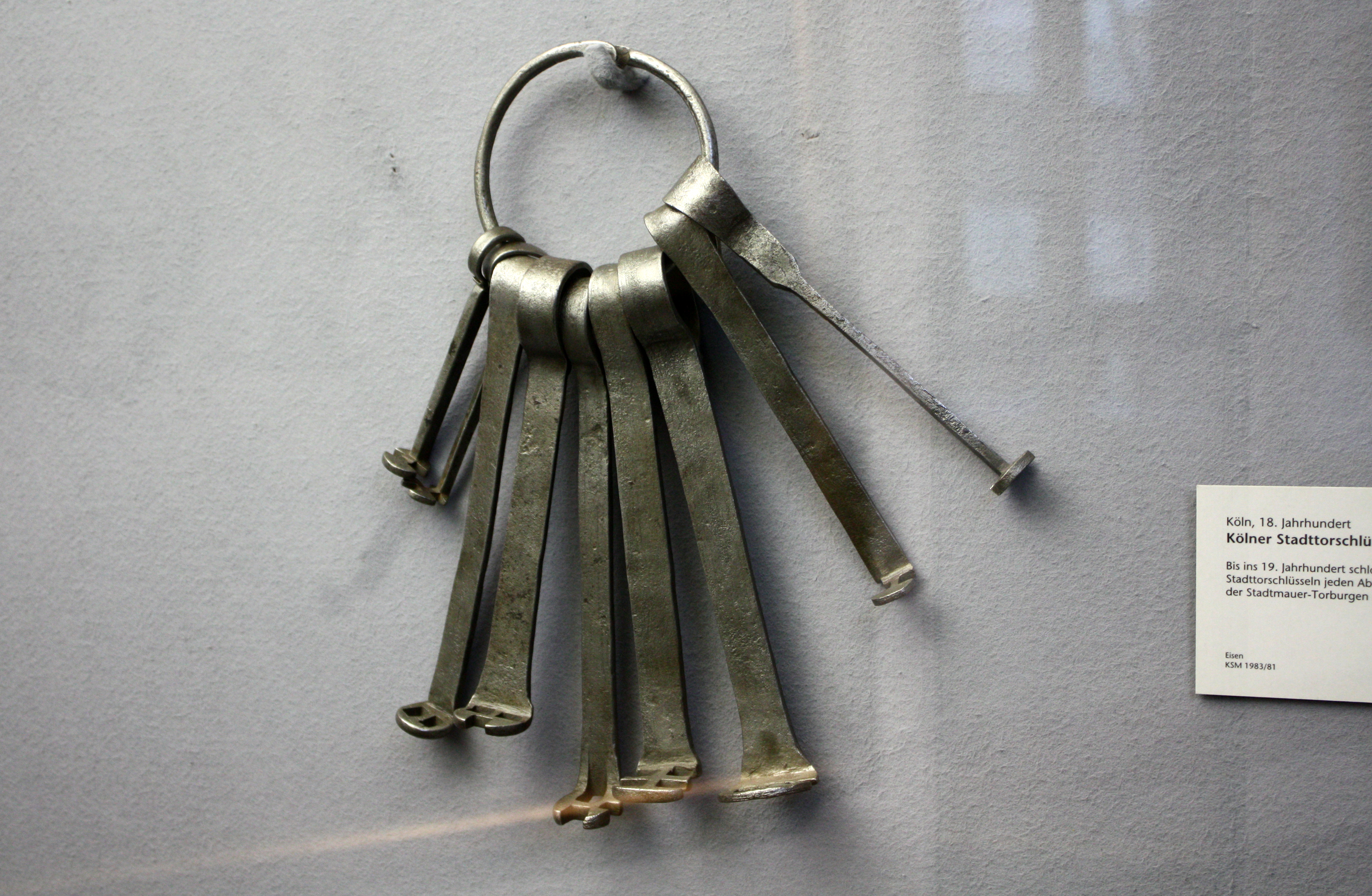 Kölner Stadttorschlüssel 18.Jahrhundert